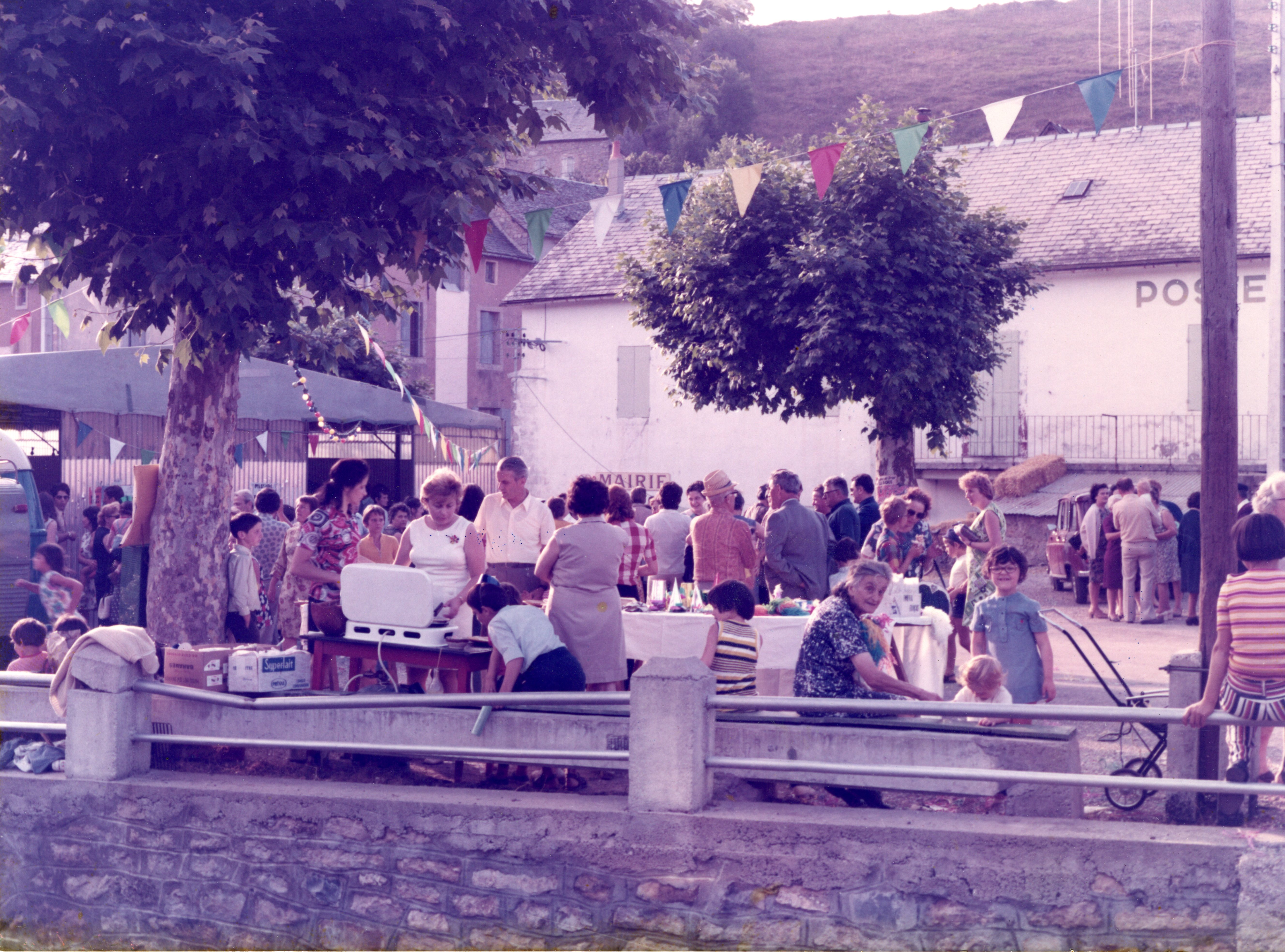 Archive : Fête Lanuéjols 1972